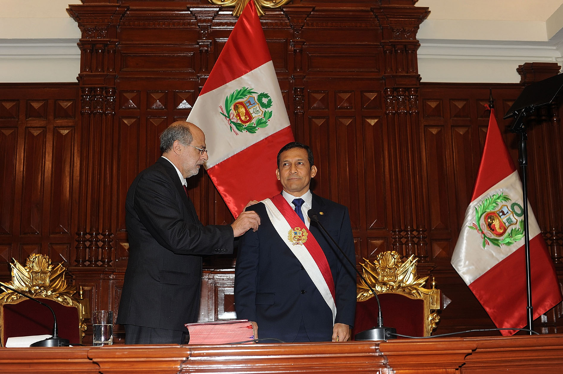 Ollanta Humala Tasso asume la Presidencia de la República en sesión solemne realizada esta mañana en el Congreso. La banda presidencial correspondiente le fue impuesta por el titular del Poder Legislativo, Daniel Abugattás Majluf.